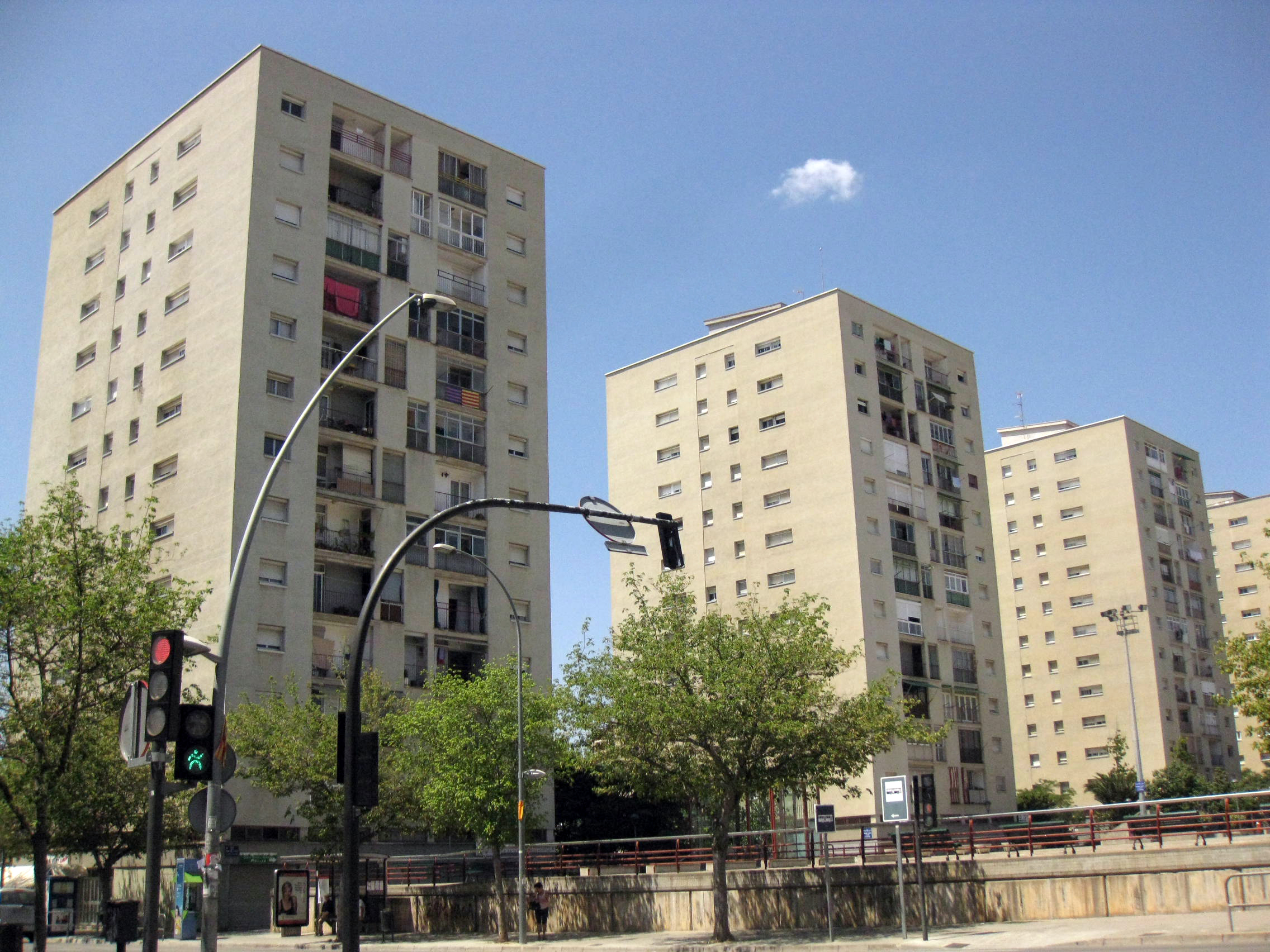 Pisos de Sant Llorenç, vora la carretera de Castellar (Terrassa)